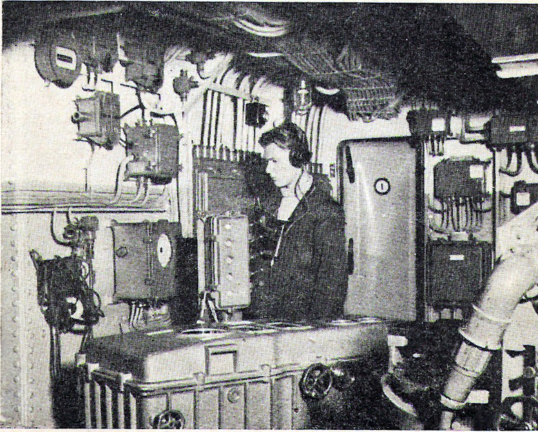 putoamakellon hoitaja suomalaisen panssarilaivan tulenjohtokeskuksessa